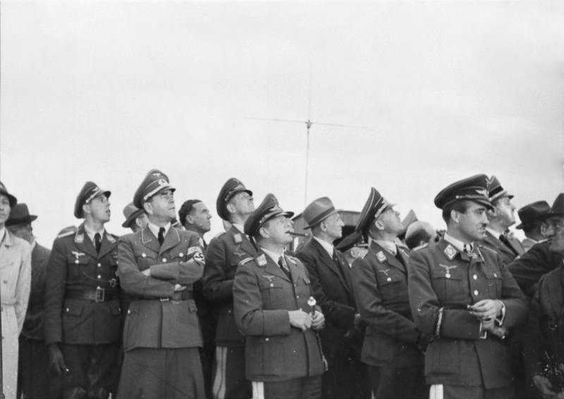 Zentralbild II. Weltkrieg 1939 - 1945 Rüstungstagung in Rechlin am Müritzsee vom 5.-7. September 1943. Die Konferenzteilnehmer beobachten ein neues Flugzeug. UBz: vorn: Reichsminister für Rüstung und Kriegsproduktion Prof. Albert Speer, Generalfeldmarschall Erhard Milch, Generalmajor der Flieger Adolf Galland.